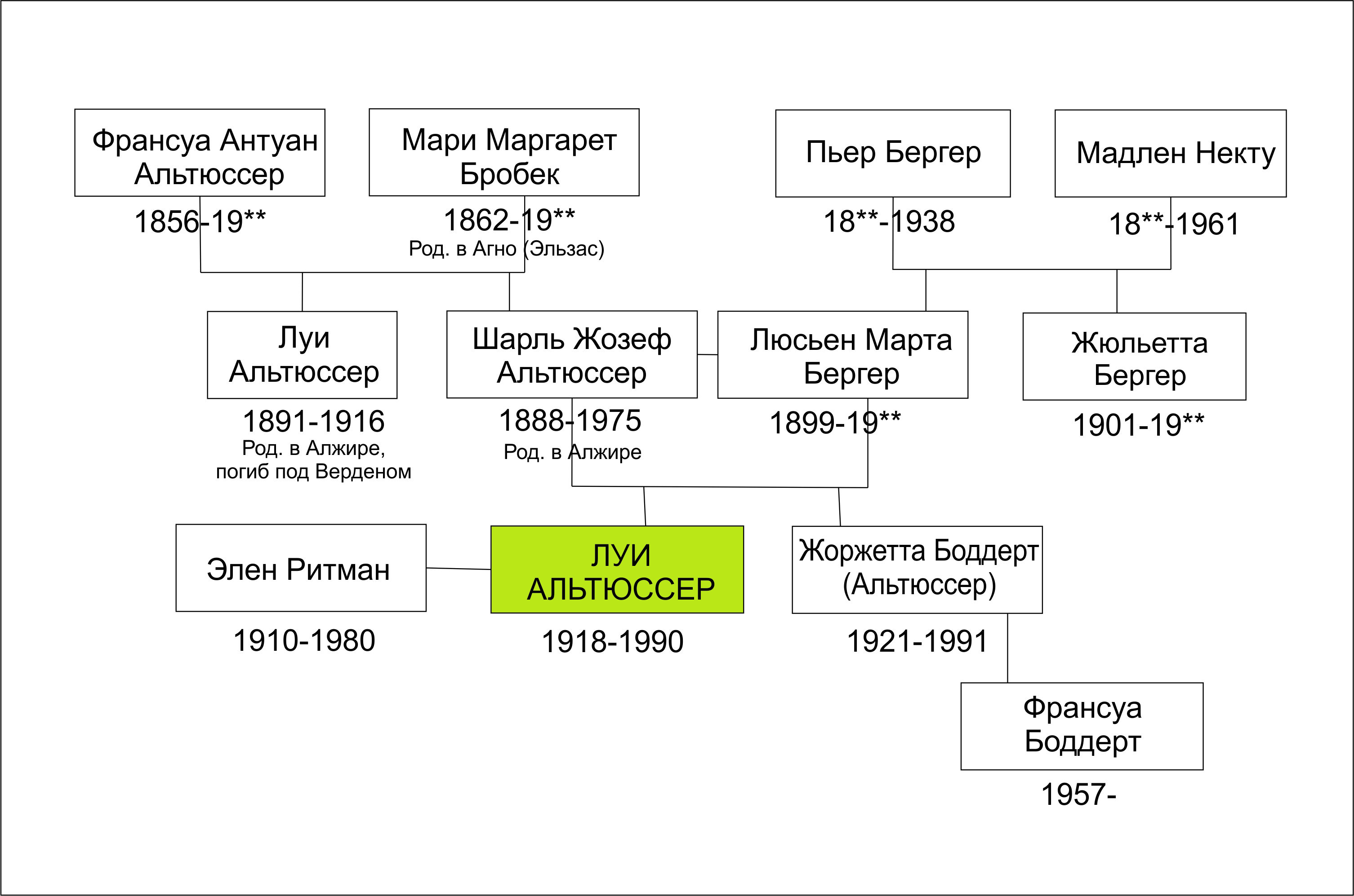 семейное древо философа Луи Альтюссера see: Althusser, Louis. L'avenir dure longtemps suivi de Les faits. Flammarion, 2013. ISBN 978-2081284692.